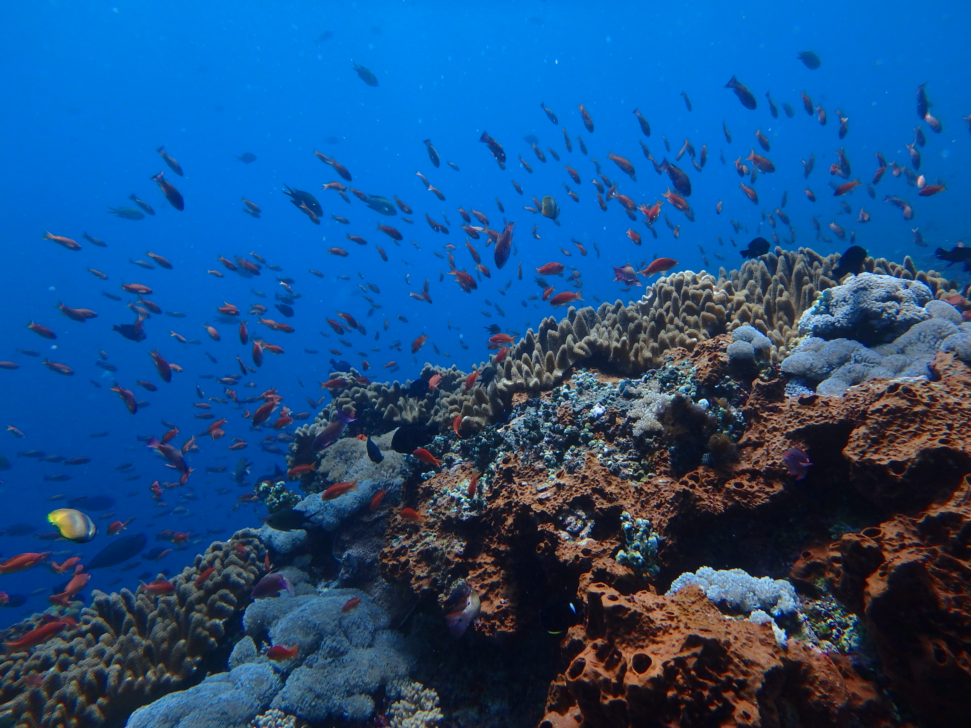 レンボンガン島海域のサンゴ礁